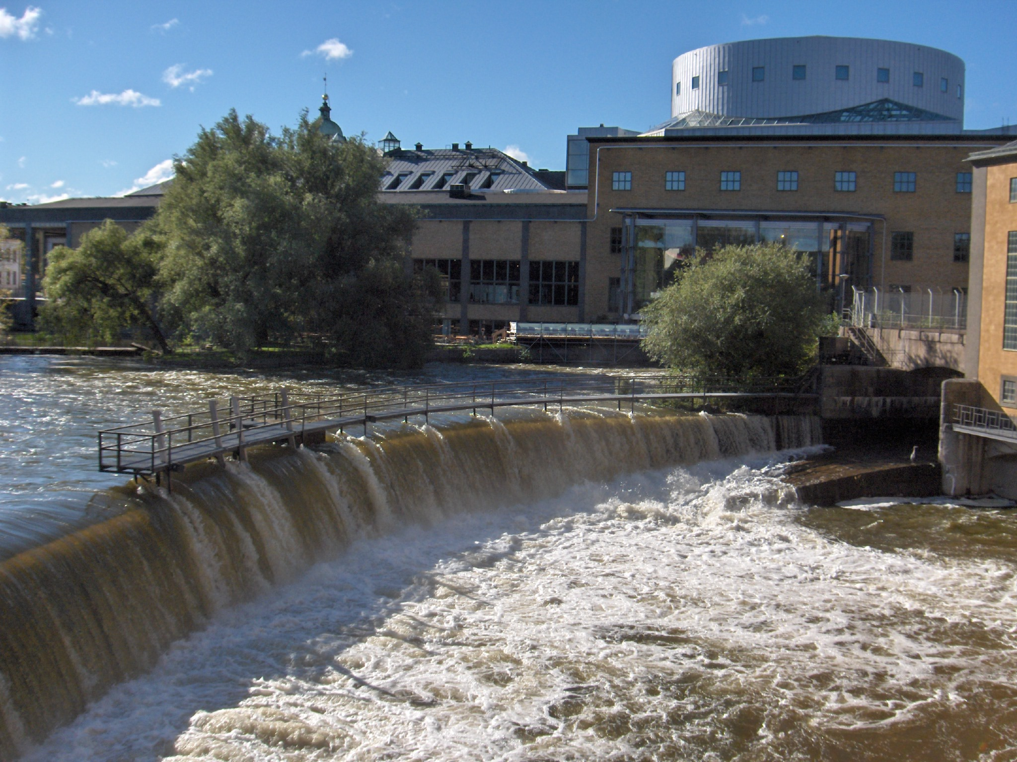 中文（中国大陆）: 旧工场区附近的穆塔拉河